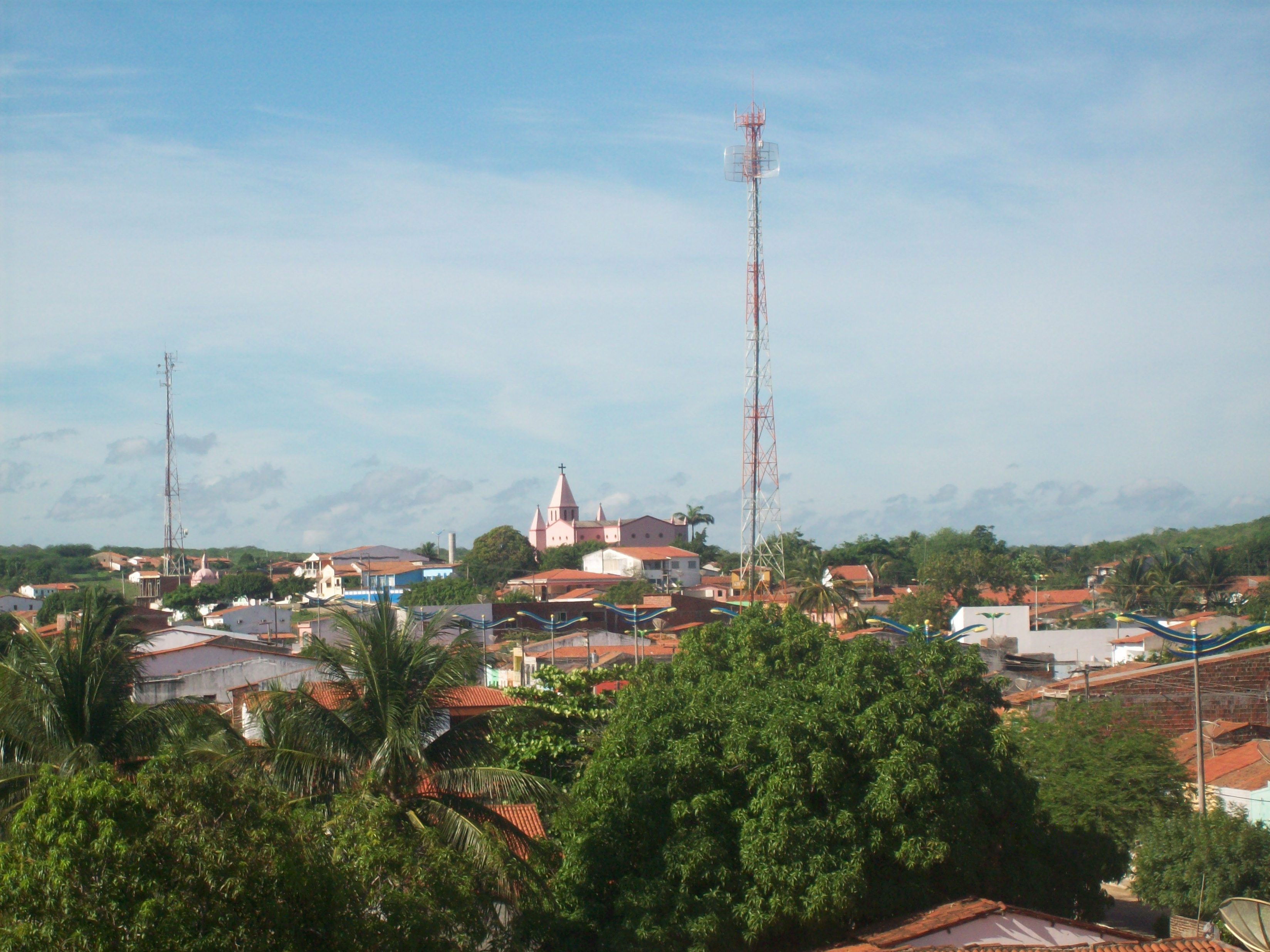 Itapiuna CE Brasil - Vista Parcial